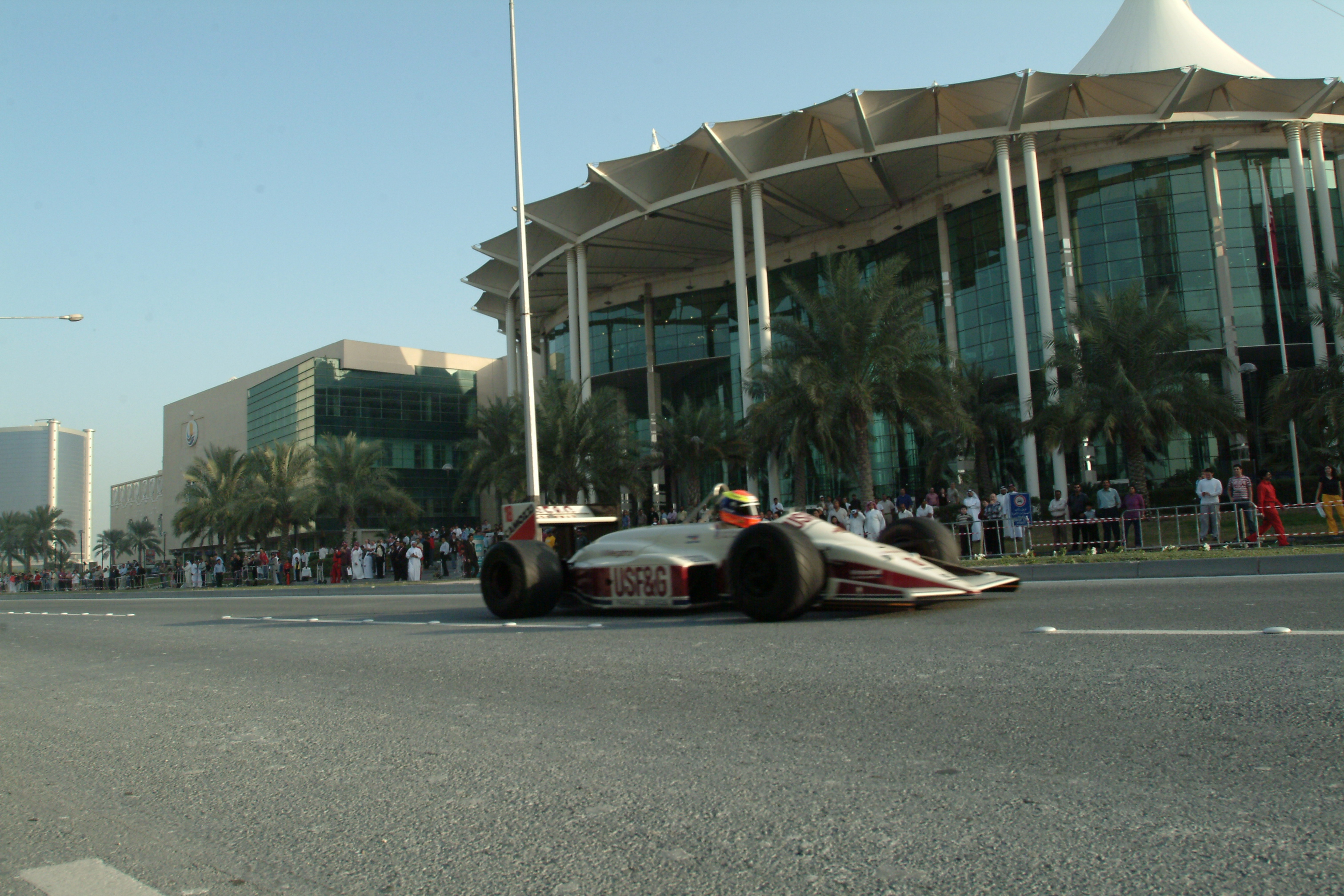 Arrows A10B im Einsatz